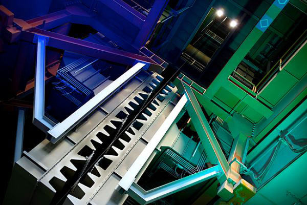 Motiv aus dem Bereich "Industriephotographie" von Manfred Zimmermann